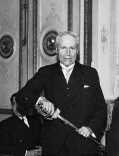 Au Louvre, remise de l'épée de Mr Jamot : photographie de presse (Agence Meurisse). Détail